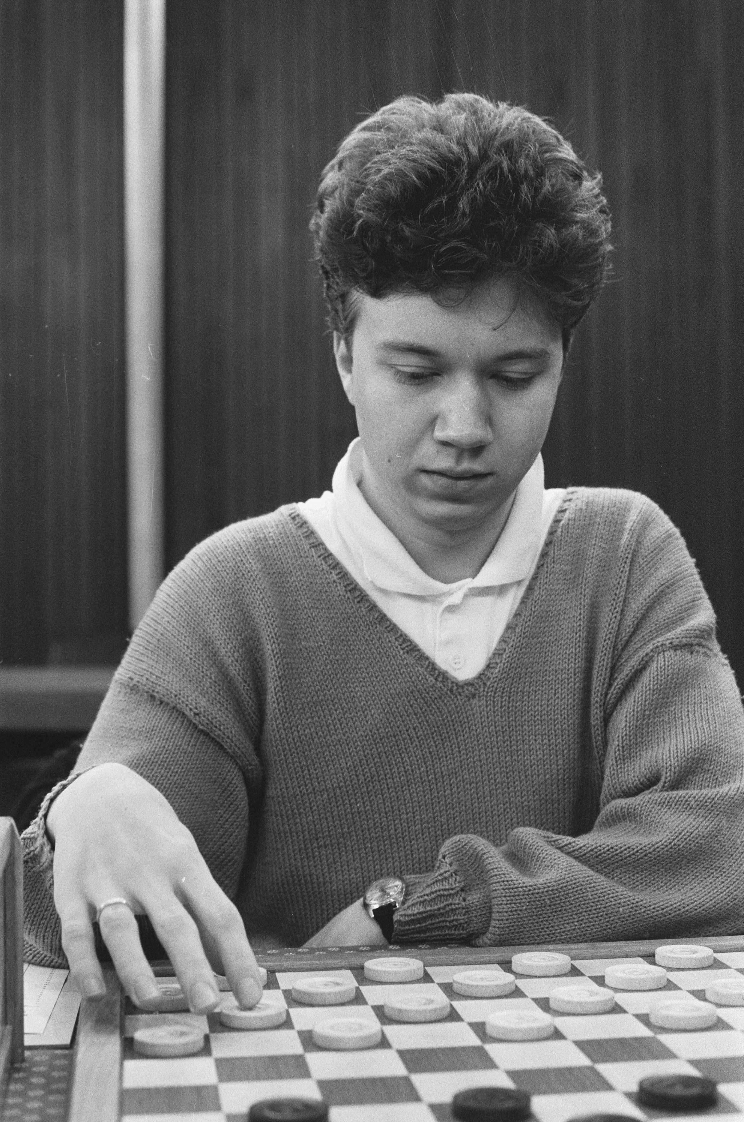 Collectie / Archief : Fotocollectie Anefo Reportage / Serie : [ onbekend ] Beschrijving : NK dammen 3e ronde in Nijverdal; Hendrik van der Zee , close Datum : 16 april 1987 Locatie : Nijverdal Trefwoorden : DAMMEN Fotograaf : Croes, Rob C. / Anefo Auteursrechthebbende : Nationaal Archief Materiaalsoort : Negatief (zwart/wit) Nummer archiefinventaris : bekijk toegang 2.24.01.05 Bestanddeelnummer : 933-9555